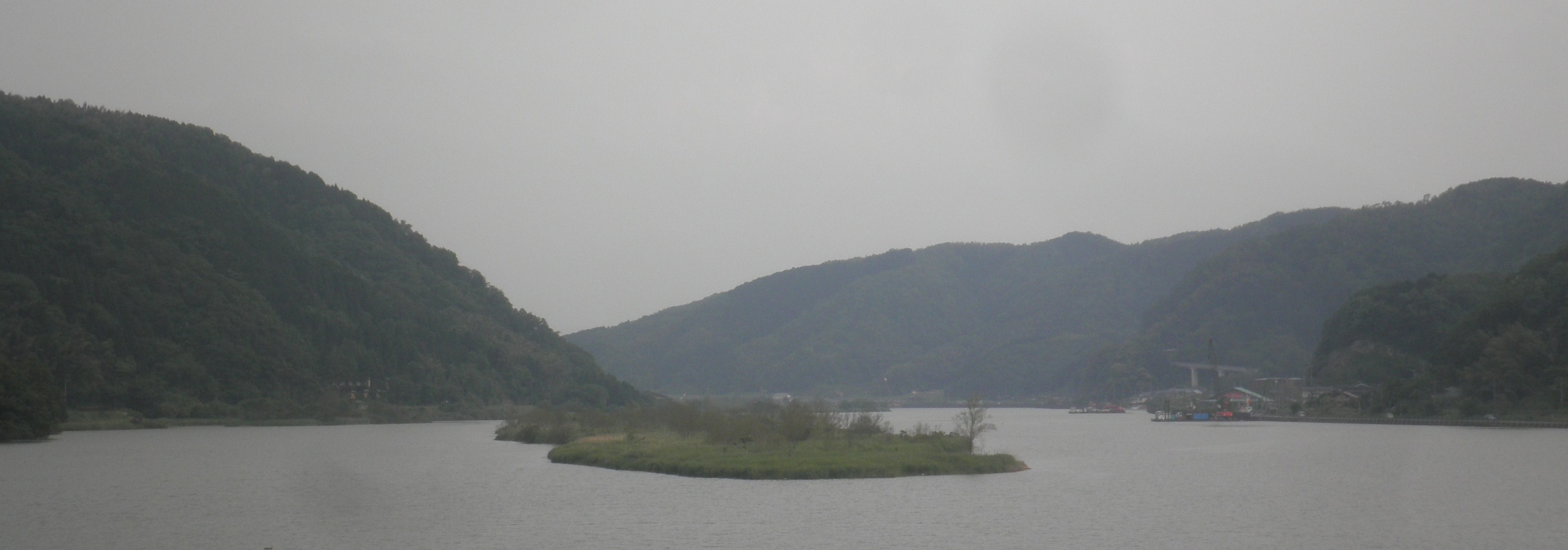 兵庫県豊岡市、円山川にある大きな中州「ひのそ島」（玄武洞駅近く）